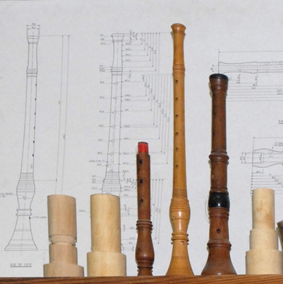 Le Centre Occitan des Musiques et Danses Traditionnelles (COMDT) Toulouse Midi-Pyrénées est un lieu de ressources consacré, à travers ses différents secteurs, à la culture occitane de tradition orale, principalement dans les domaines de la musique instrumentale, de la danse et du chant traditionnels. Il est membre de la FAMDT, Fédération nationale des Centres régionaux et associations de musiques et danses traditionnelles. Depuis sa création (30 ans) l’atelier de lutherie collabore avec d’autres chercheurs à la reconstitution d’instruments. Ainsi, il a pris une part importante dans le renouveau des flûtes, cornemuses et hautbois occitans. Il participe actuellement à une recherche interrégionale sur la bodega ou craba (cornemuse de la Montagne Noire). L’atelier de facture instrumentale réalise des aboès (hautbois du Couserans) : tonalité en Ré ; des hautbois de Valhourles (Rouergue) : tonalité en Sol et des boha (cornemuse des Landes de Gascogne) : tonalité en La et en Sol.